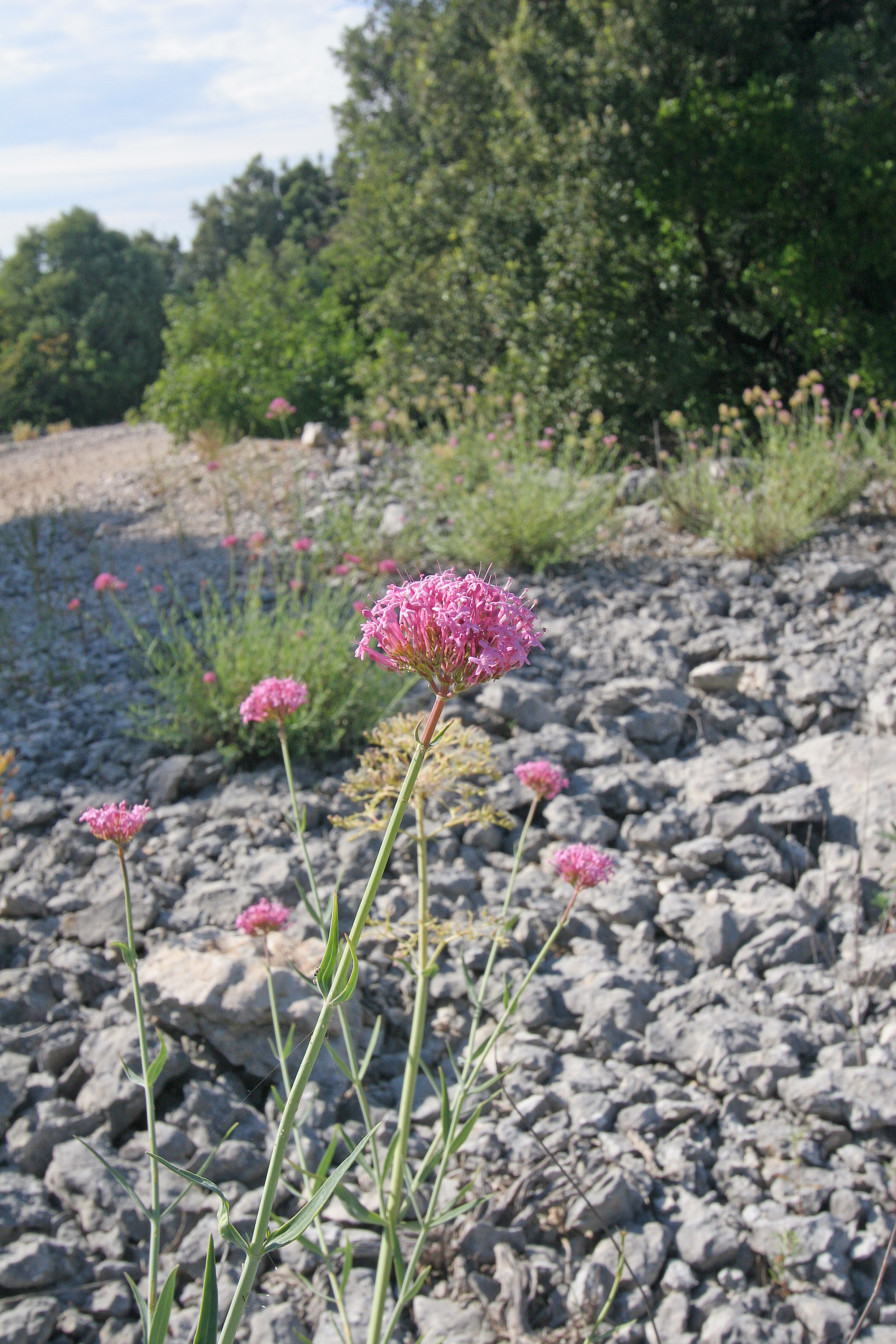 Plants in Ardeche